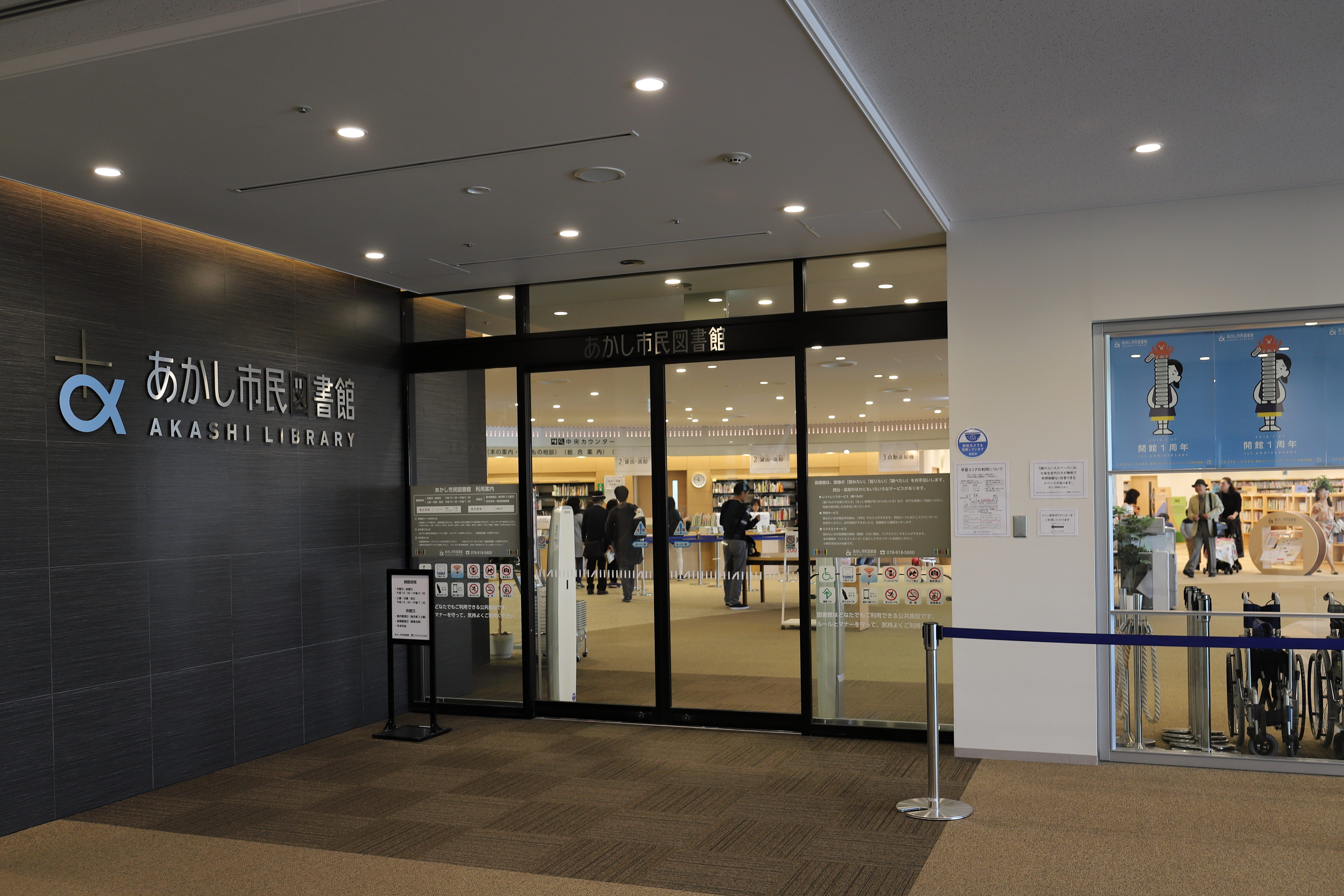 あかし市民図書館